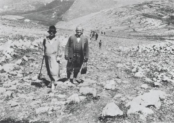 גליל - הגברת הנרייטה סאלד בטיול